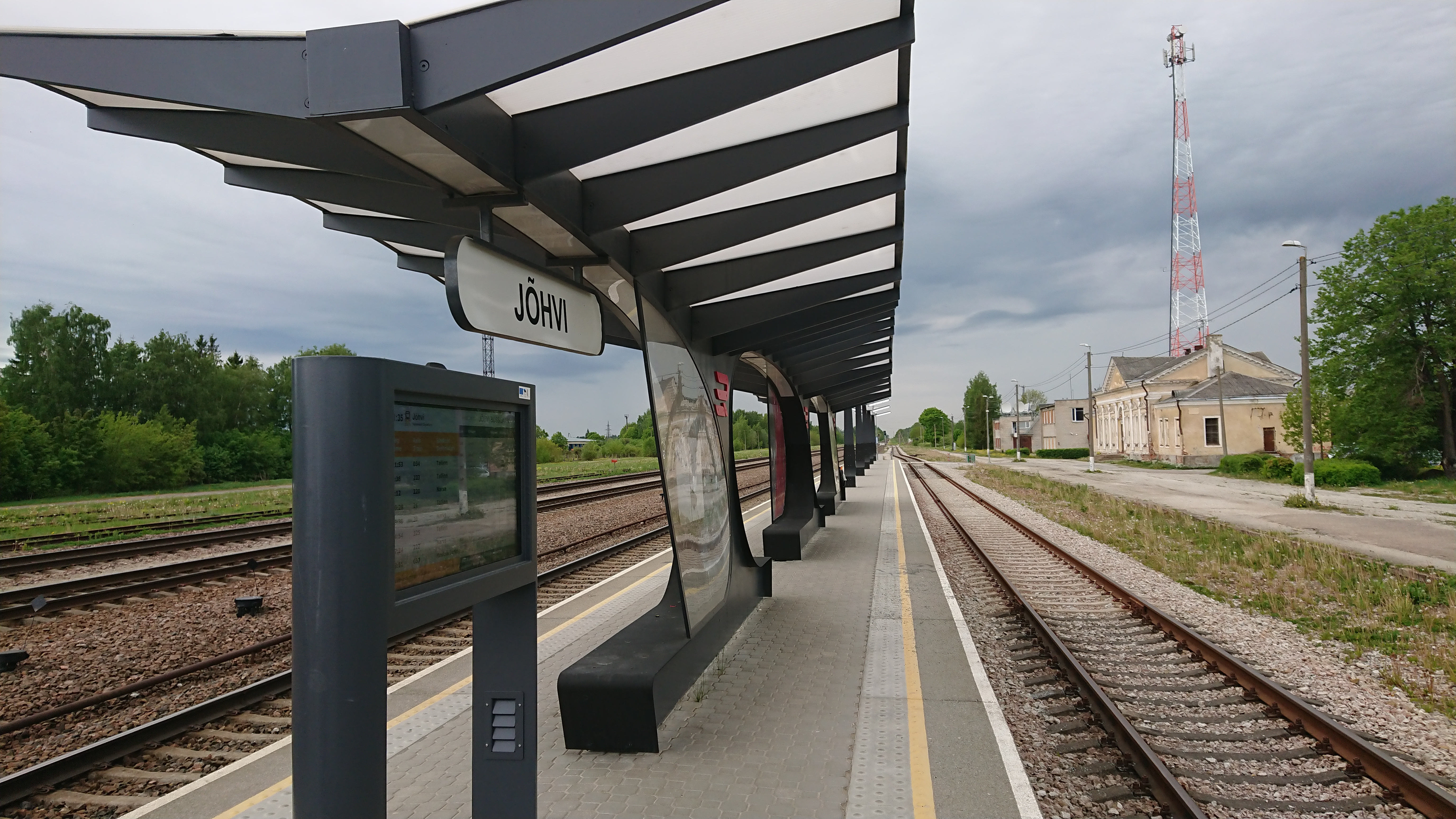 Ж/Д станция Йыхви 2019 год